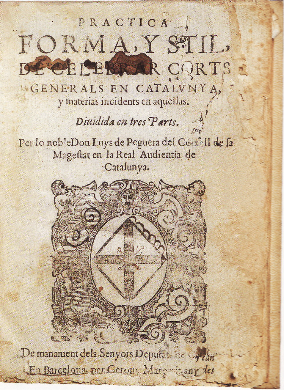 Forma i stil de celebrar Corts Generals en Catalunya, obra del jurista i membre de la Reial Audiència de Catalunya. Va ser escrit cap el 1606, però no va ser publicat fins el 1632.